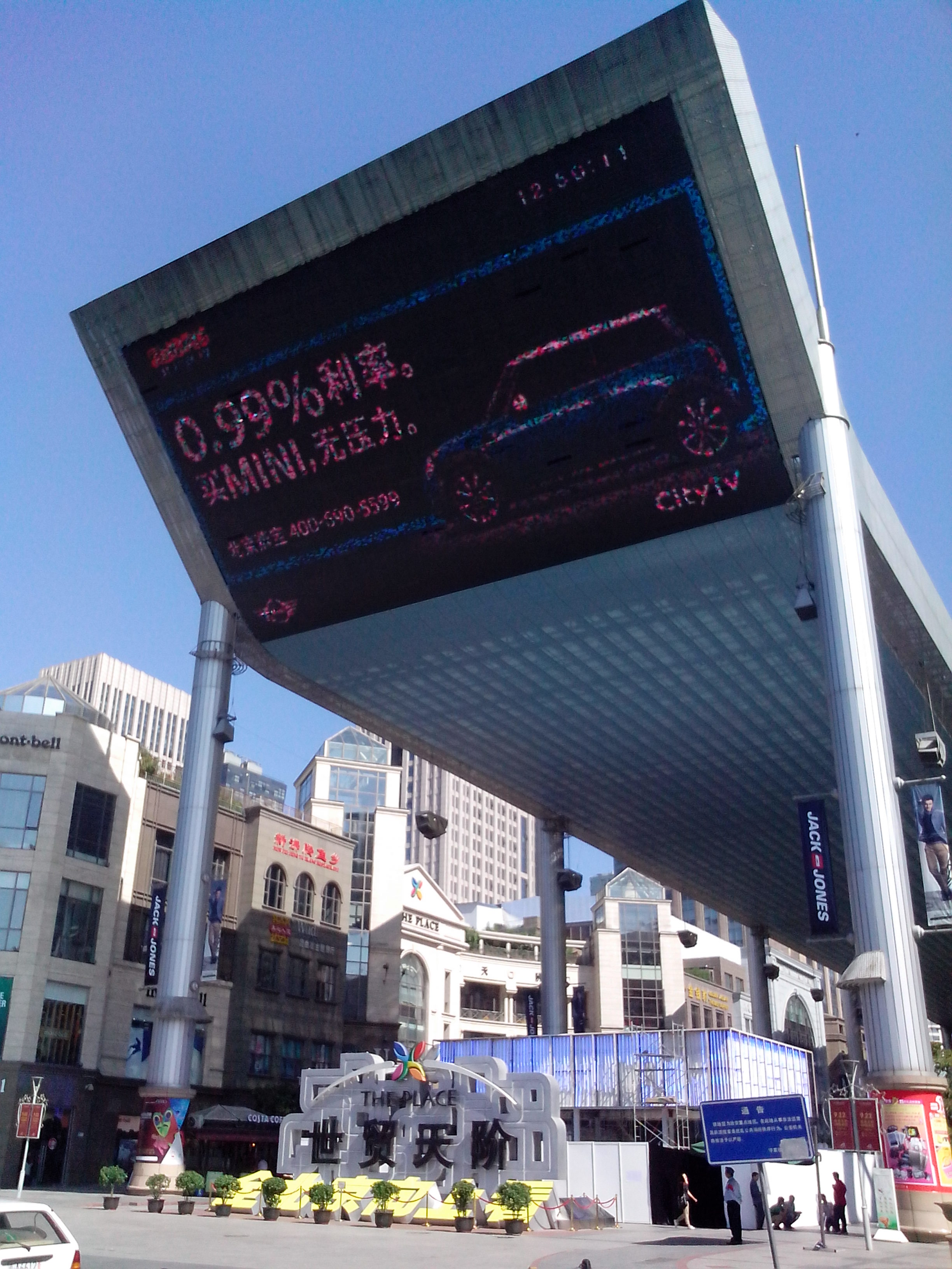 中文（中国大陆）: 北京世贸天阶